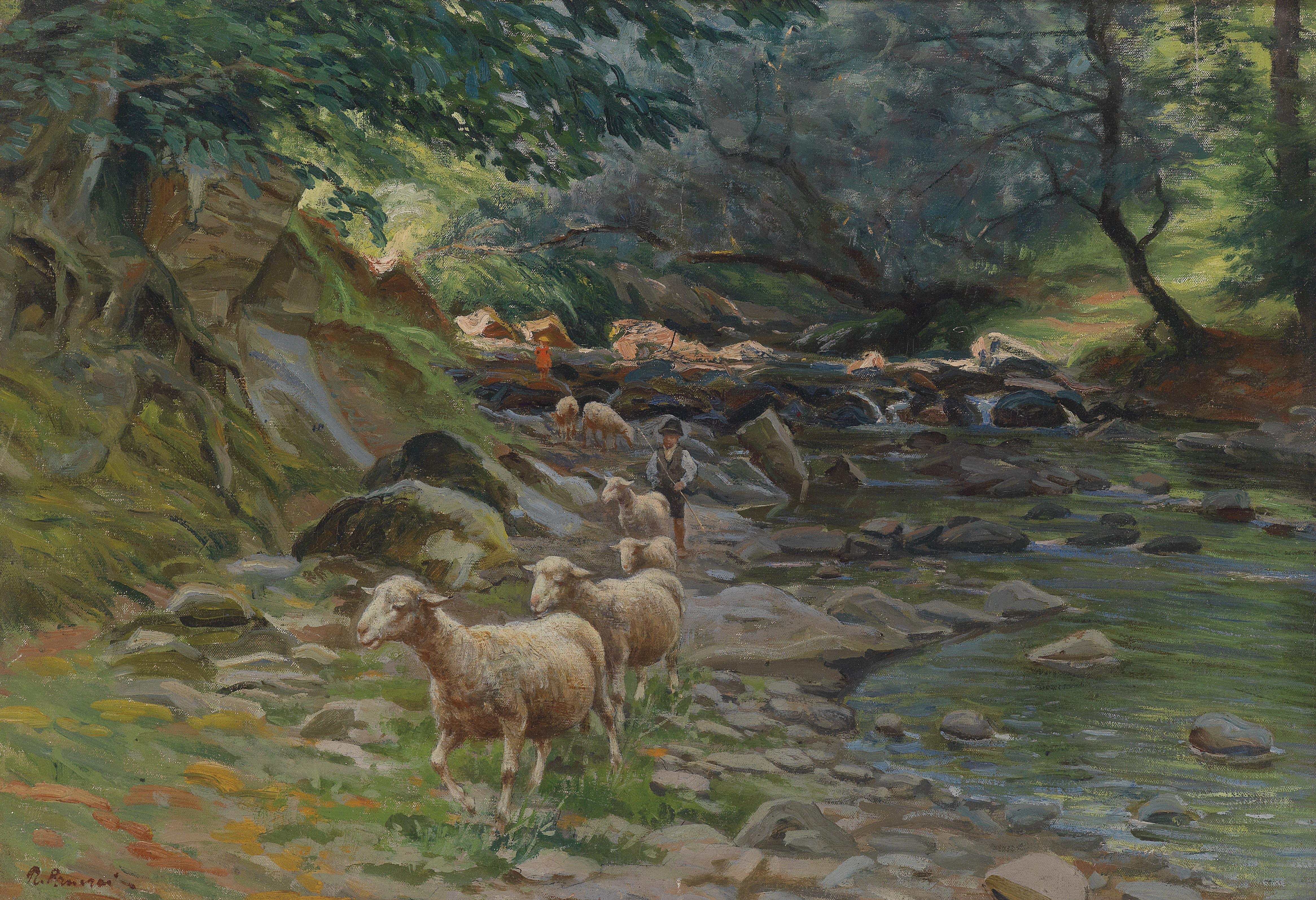 Schafherde und kleine Hirten am Bachufer